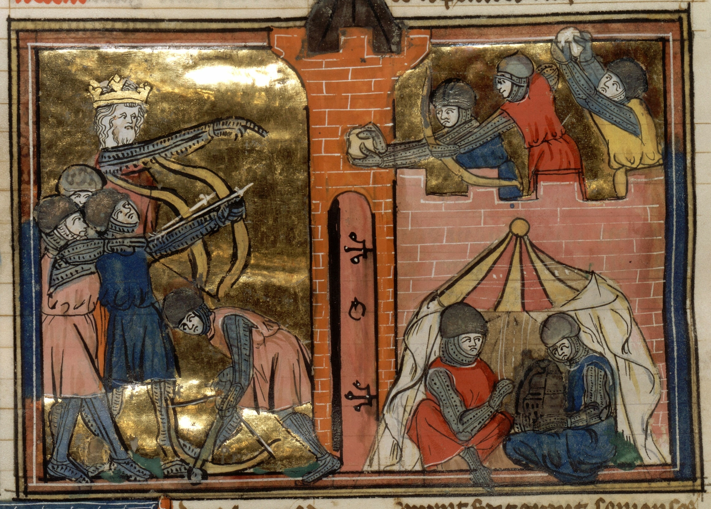 Siège de Shaizar (1138)